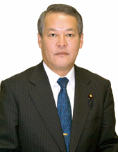 Minister Minoru Yanagida.